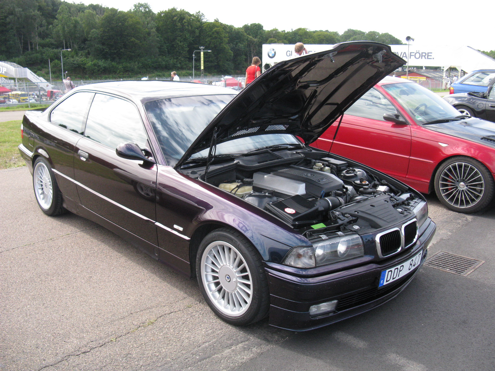 BMW Alpina B8 4.6 Coupé E36